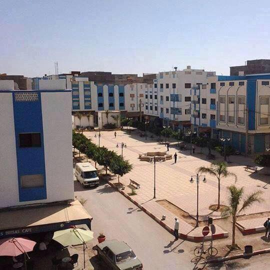 وسط مدينة بن الطيب، إقليم الناظور، جهة الشرق